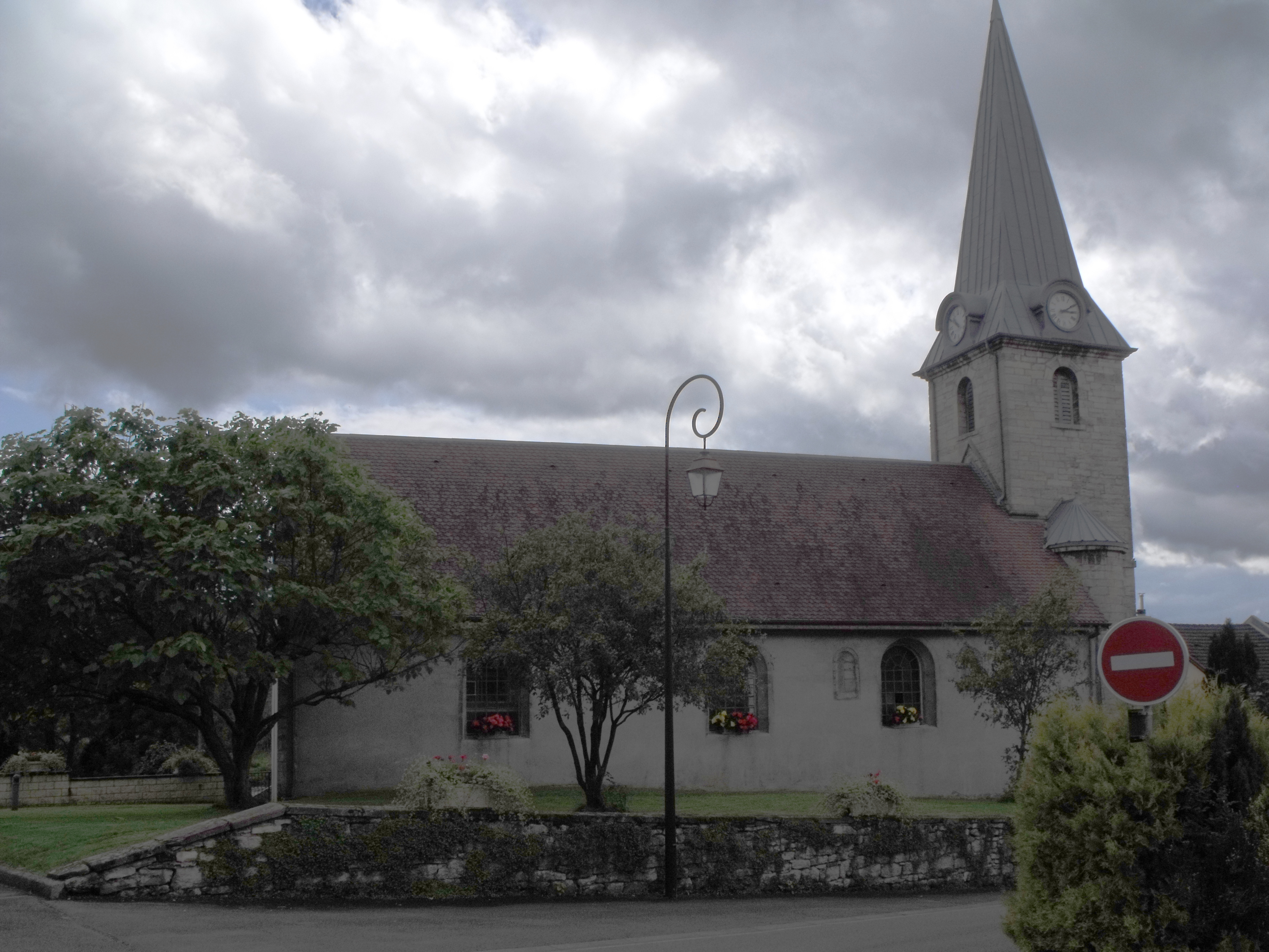 Temple de Longevelle Sur Doubs, Doubs, France